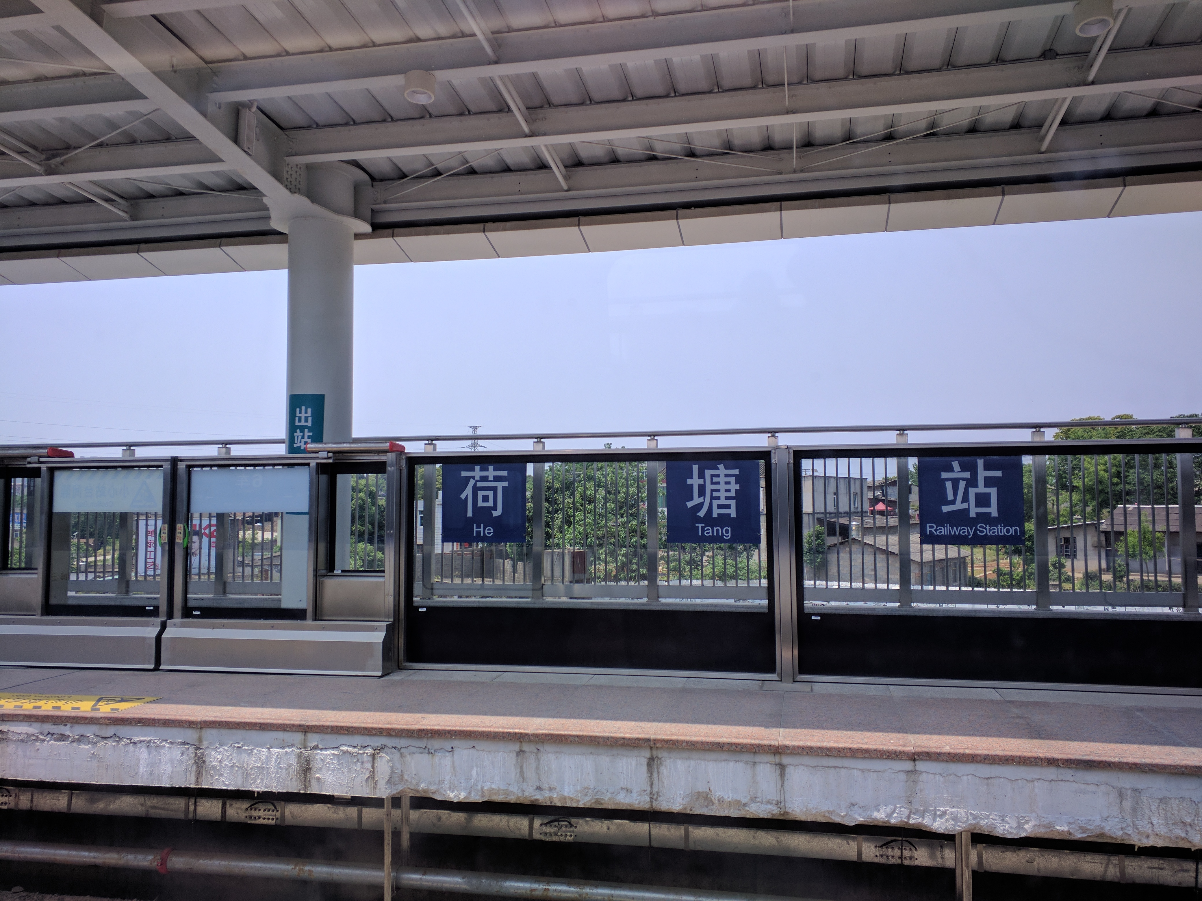 中文（中国大陆）: 长株潭城际铁路荷塘站1站台标识